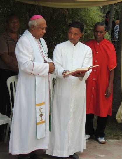 Basílio do Nascimento, Bischof von Baucau. Rede zum 50jährigen Jubiläum der Pfarrei Becora